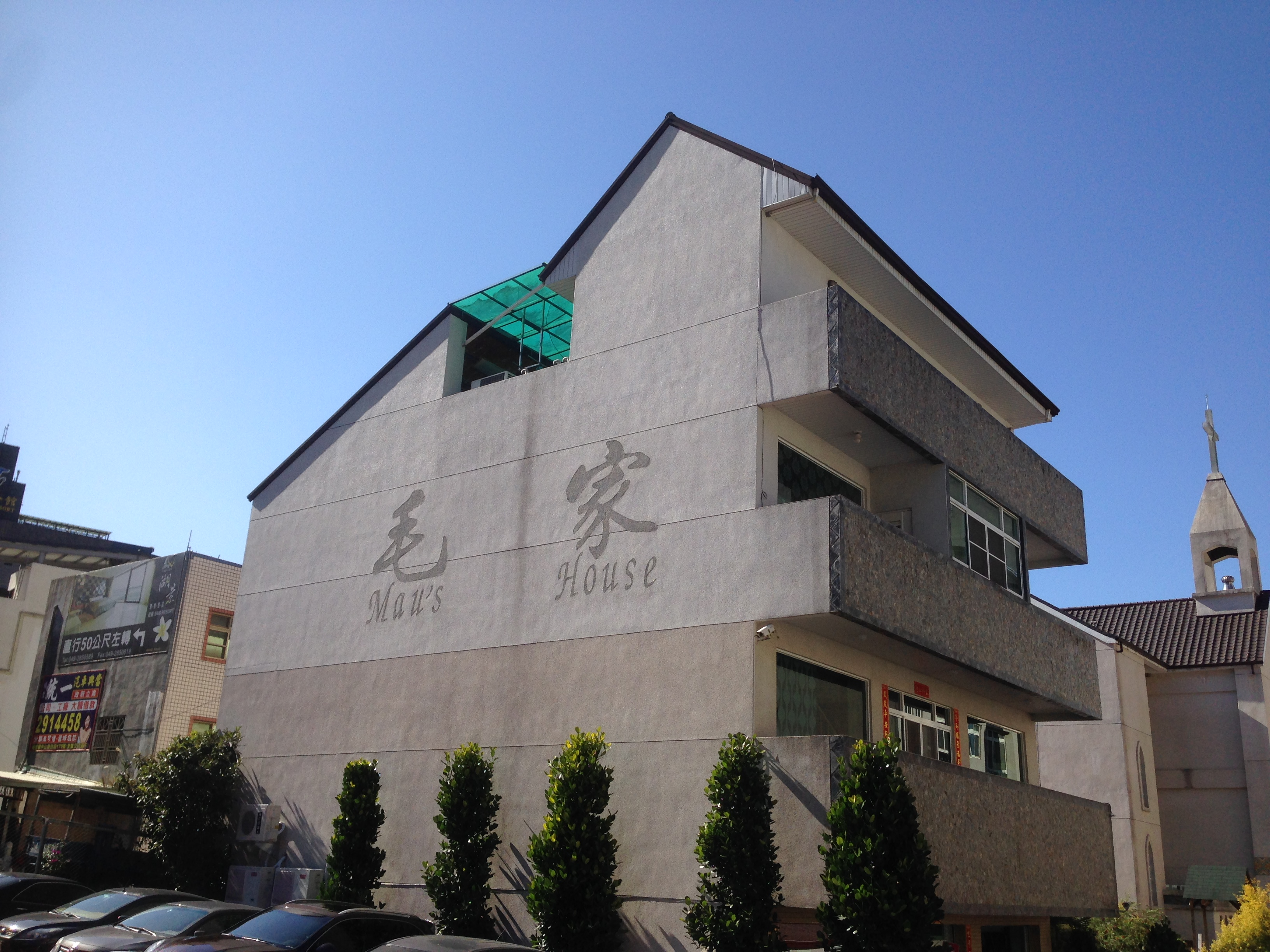 中文（台灣）: 日月潭毛家